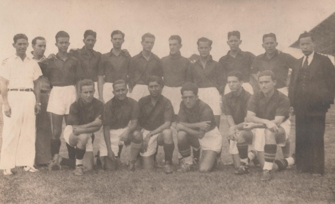 Sin conocer la derrota en sus presentaciones, Alajuelense campeónizó en forma invicta en el Campeonato de la Primera División de 1941. De pie: Alejandro Morera (entrenador), Melico Valverde, Tomás Alfaro, Rogelio Fernández, Rodrigo “Chino” Moreno, Jorge “Lalo” Rojas, , Luis Ángel Salas, Carlos Arroyo, Claudio “Chopita” Padilla, Héctor Cordero y Francisco Ortiz. Abajo: Ramón Arroyo, José Luis “Chime” Rojas, Salvador Soto “Indio Buroy”, José Riggioni, Álvaro Rojas y Mario Riggioni (foto cortesía Álvaro Rojas).